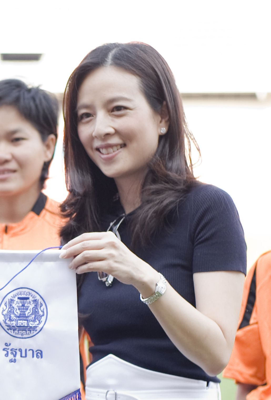 นวลพรรณ ล่ำซำ / นายกรัฐมนตรี นำทีมนักกีฬาฟุตบอลชายกิตติมศักดิ์เข้าร่วมการแข่งขันฟุตบอลนัดพิเศษกับทีม ฟุตบอลหญิงทีมชาติไทยชุดใหญ่ ณ สนามราชมังคลากีฬาสถาน กรุงเทพฯ 21 กุมภาพันธ์ 2553 (The Official Site of The Prime Minister of Thailand Photo by พีรพัฒน์ วิมลรังครัตน์)